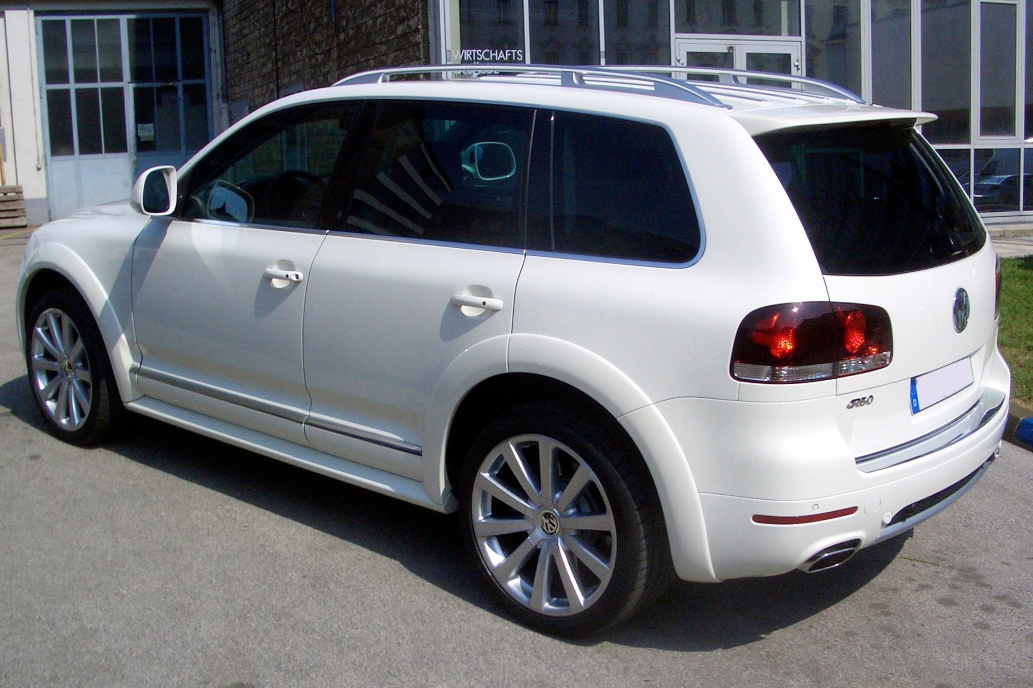 VW Touareg R50 seite